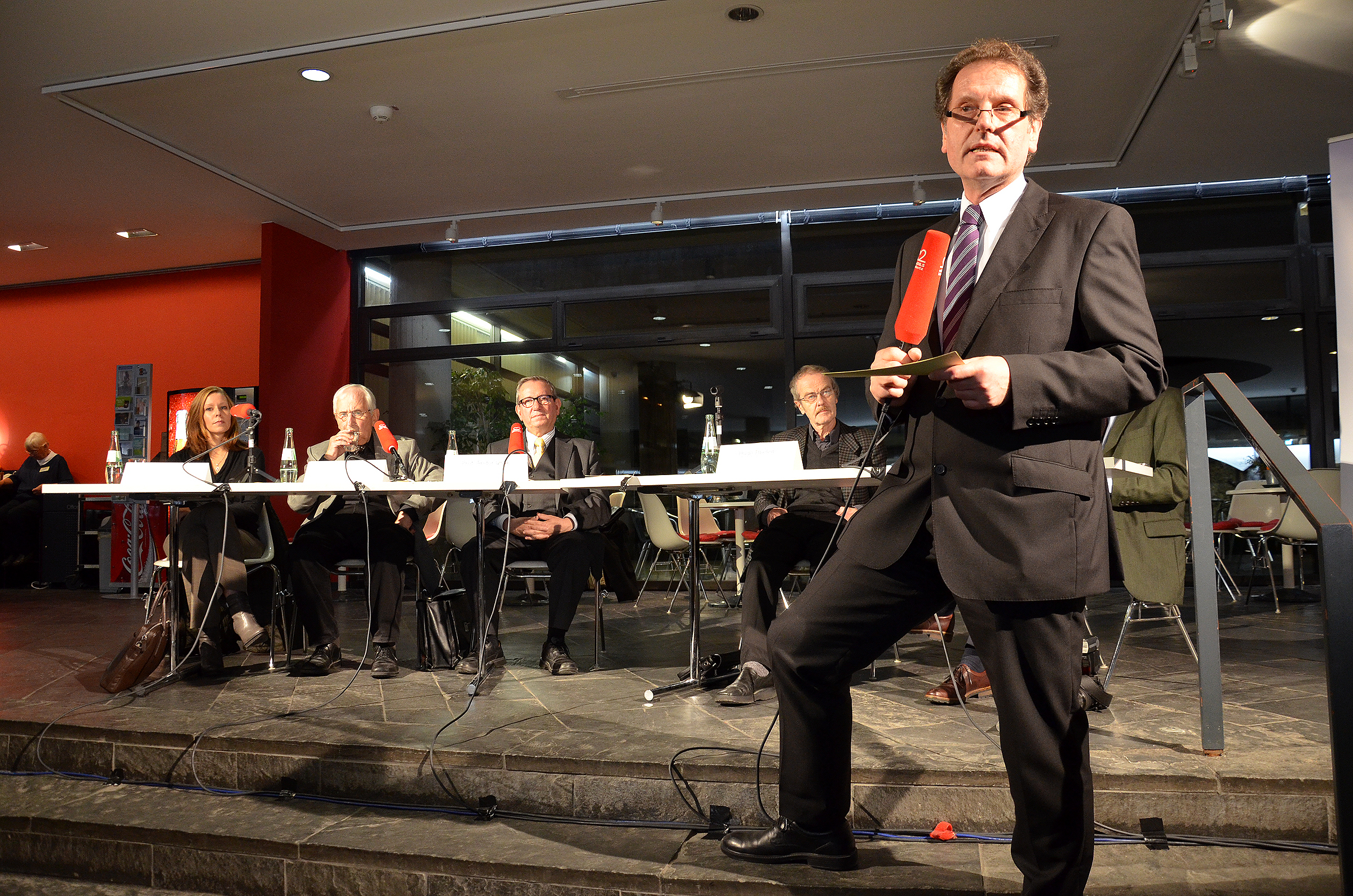 Zur Vorstellung der "vollständig überarbeiteten, erweiterten und aktualisierten Neuauflage" des Buches Jüdische Persönlichkeiten in Hannovers Geschichte begrüßte der Historiker und Museumsdirektor Thomas Schwark die rund 300 erschienenen Gäste im Historischen Museum am Hohen Ufer. In seiner Anmoderation stellte er die Podiumsteilnehmer vor (von links); die Autorin Rebecca Seidler von der Liberalen Jüdischen Gemeinde Hannovers, den ehemaligen Stadtsuperintendenten Hans Werner Dannowski, den Musiker und Direktor des Europäischen Zentrums für jüdische Musik Andor Izsák, den selbständigen Verlagsredakteur und Mitherausgeber Hugo Thielen sowie den Moderator Michael Eberstein (hier verdeckt duch Thomas Schwark) vom Lutherischen Verlagshaus ...